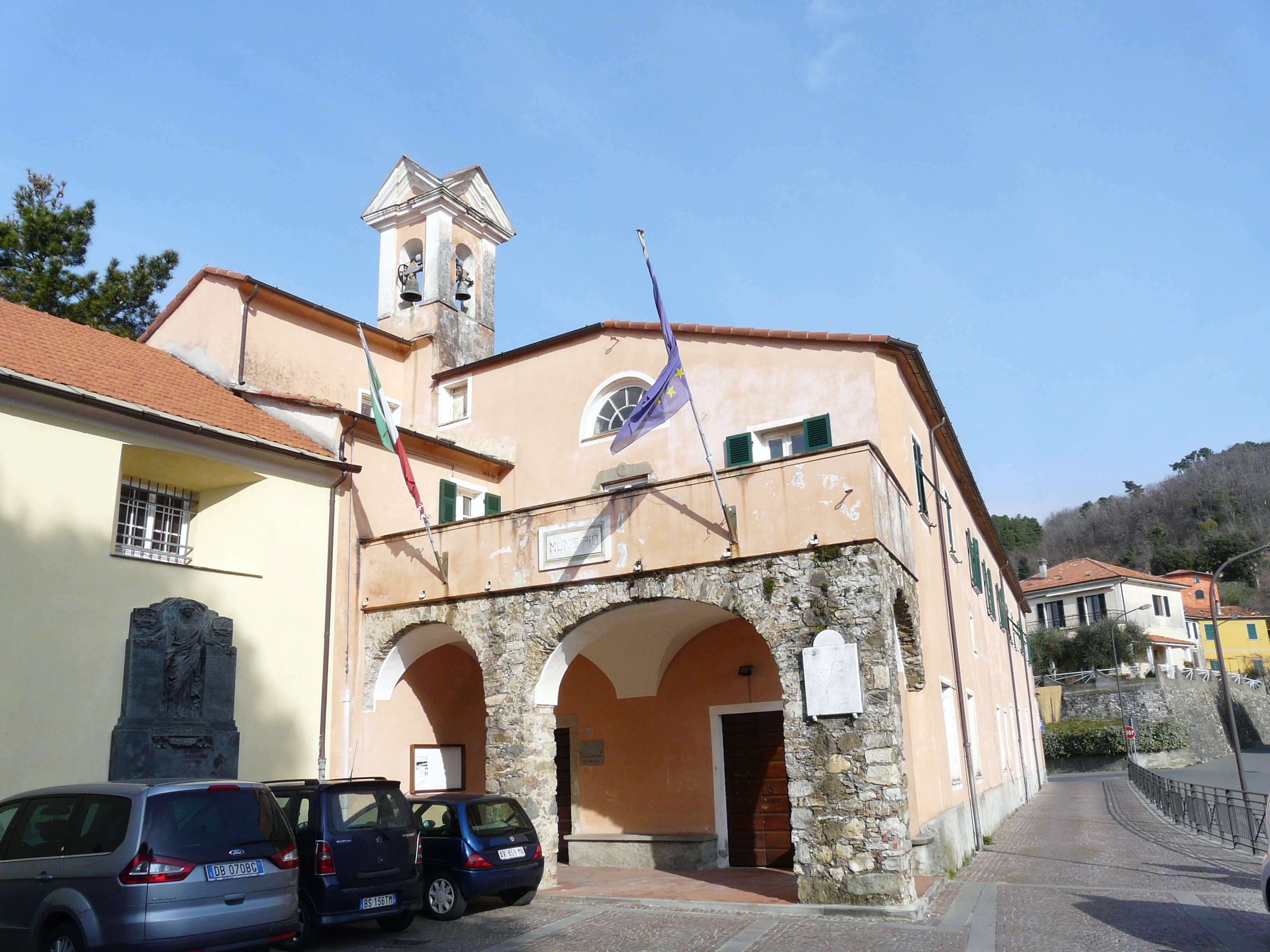 Bolano, Liguria, Italia